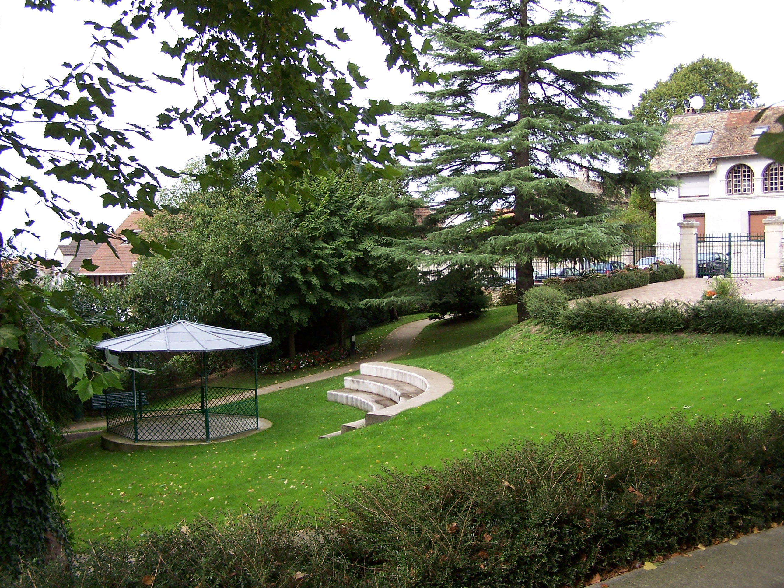 Jardin de la mairie de Villiers-Saint-Frédéric (Yvelines, France)